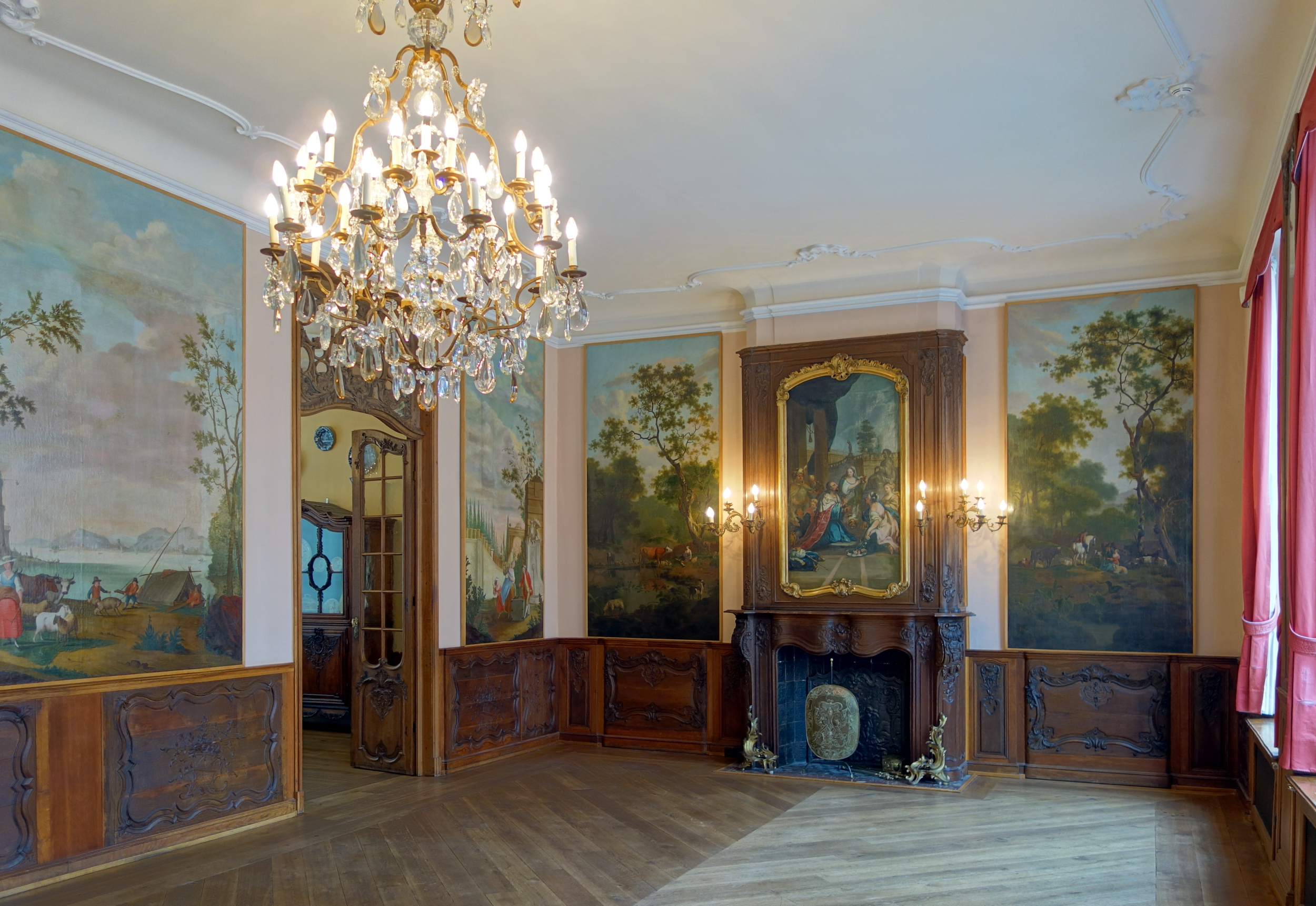 Salle des fêtes du musée Couven à Aix-la-Chapelle.